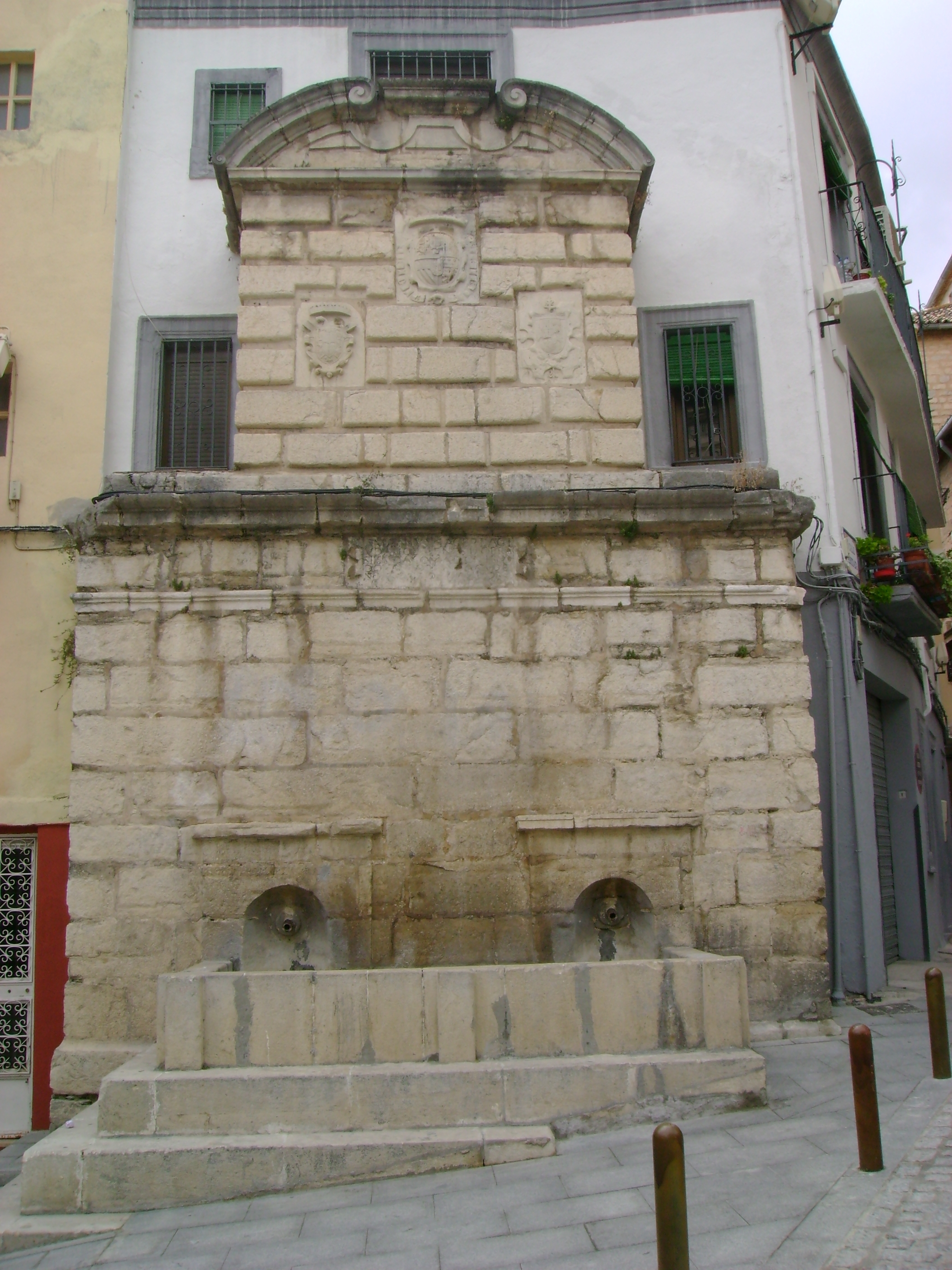 Fuente de La Merced de Jaén.